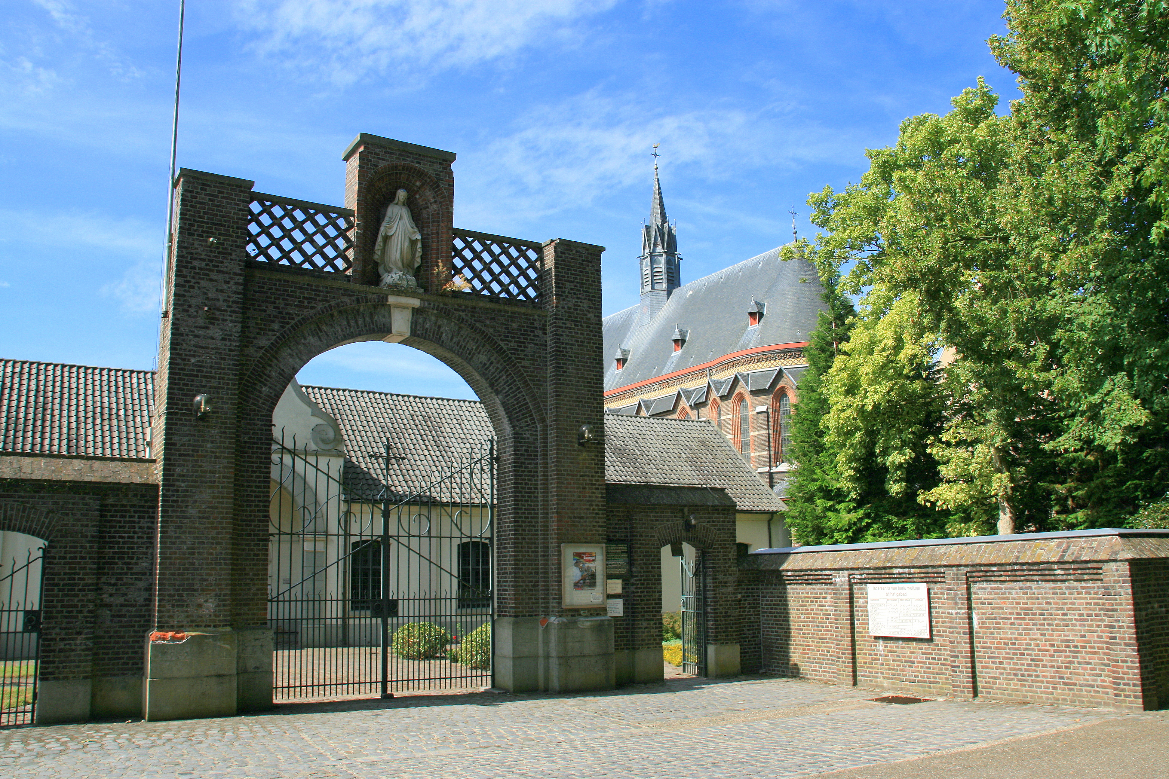 Muur met van 1886 daterende rondboogpoort met sluitsteen, geflankeerd door hoeklisenen en bekroond door een rondboognis met beschilderd Onze-Lieve-Vrouwebeeld en opengewerkte muursegmenten; ijzeren hek; aan weerszij getoogde muuropeningen met dito hekken.